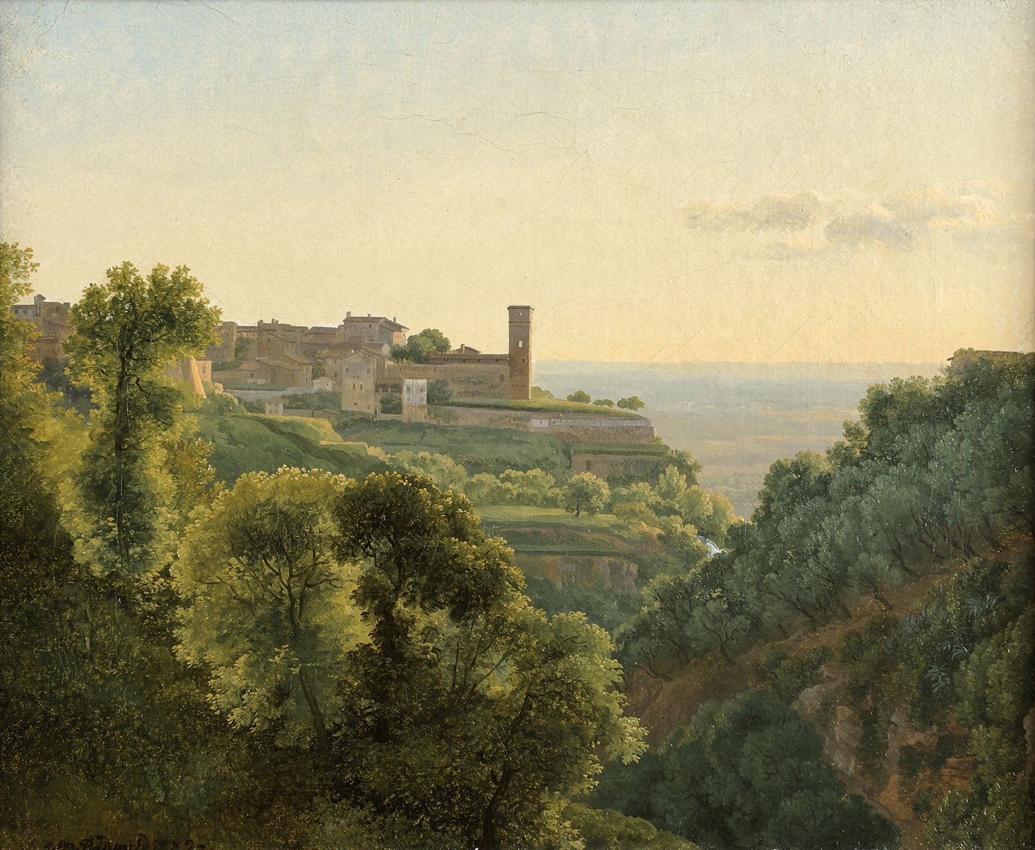 Peinture Vue de Tivoli